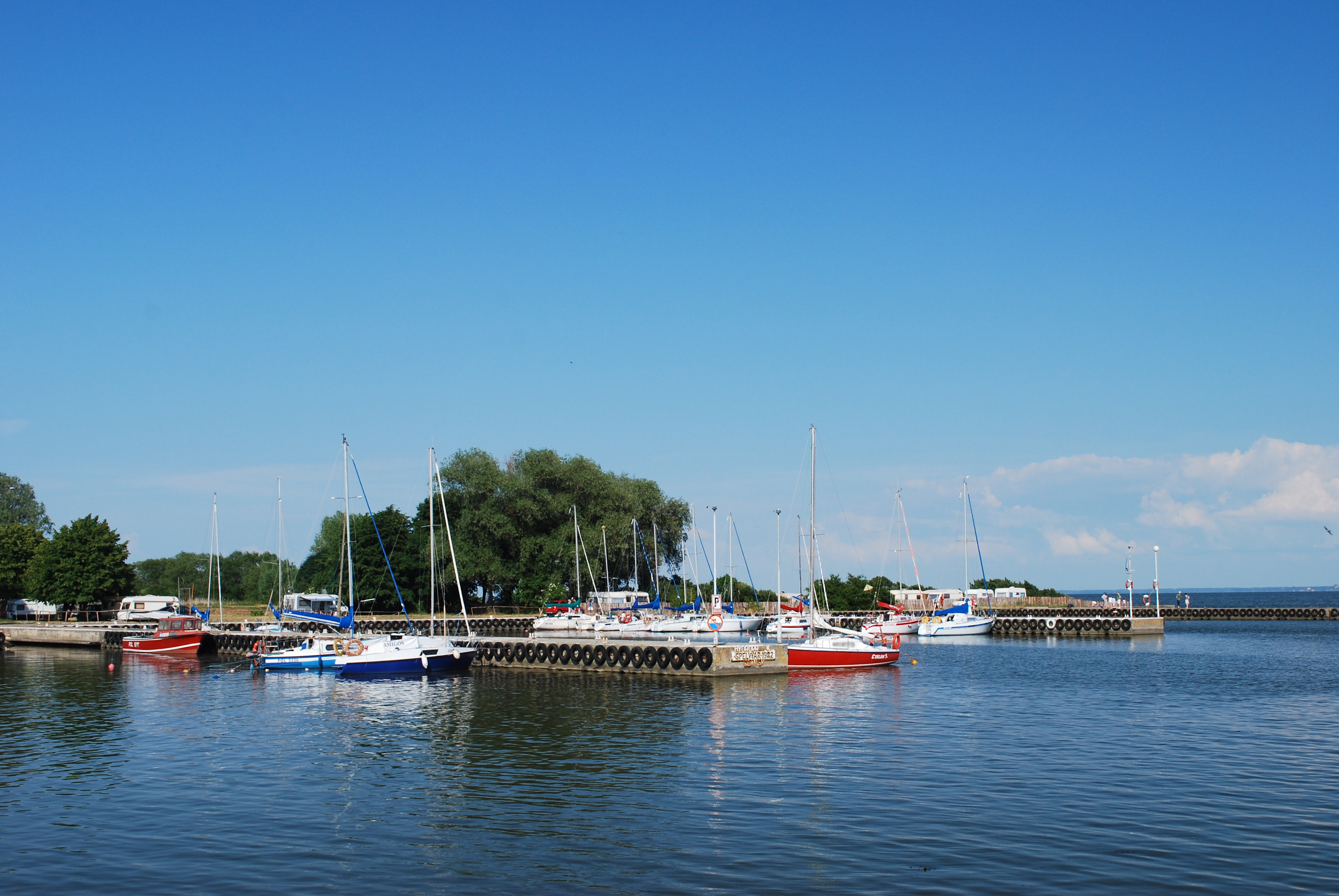 Port jachtowy w Krynicy Morskiej.